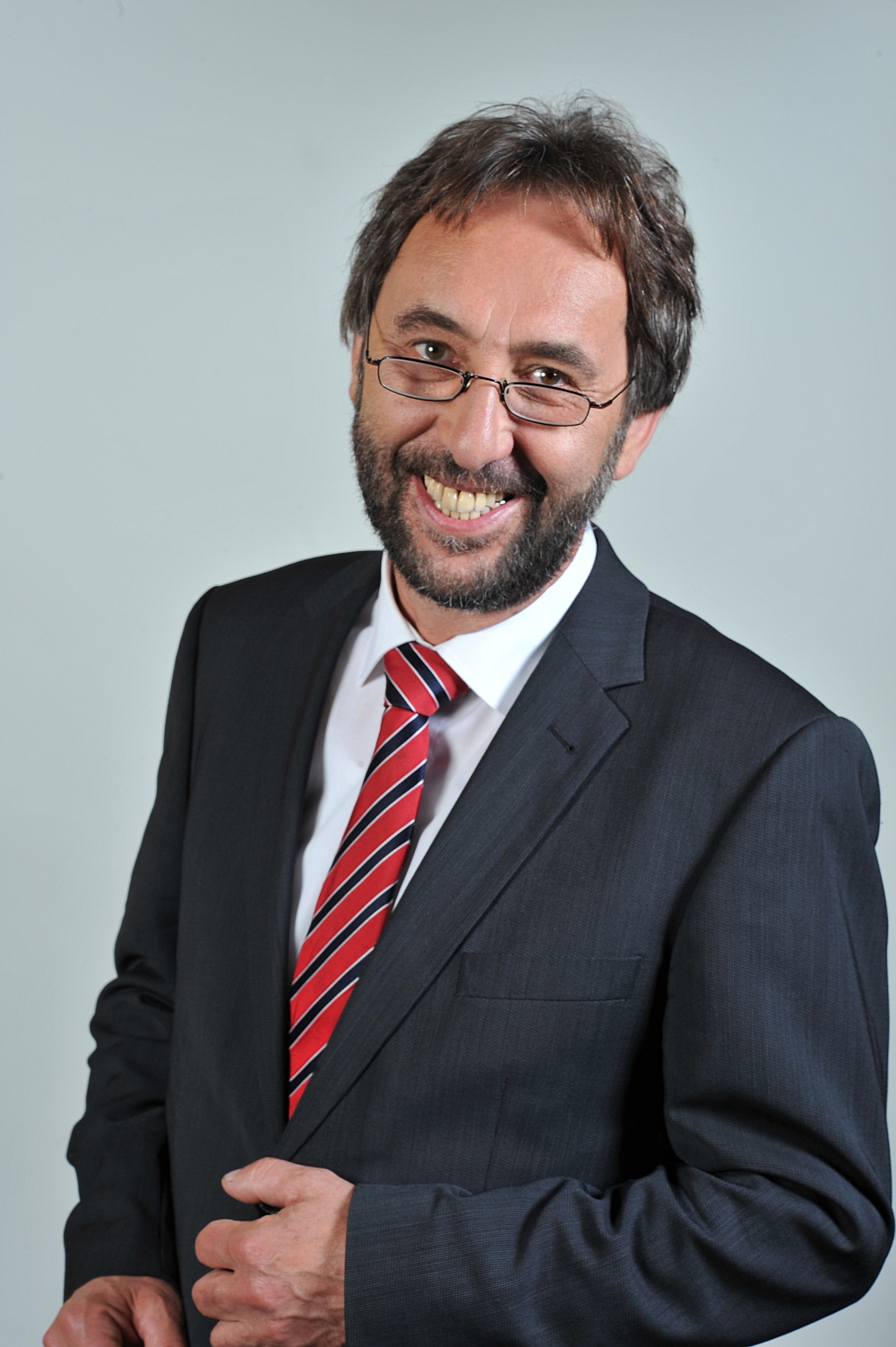 Landtagsprojekt Mecklenburg-Vorpommern 2013: Wolf-Dieter Ringguth, CDU